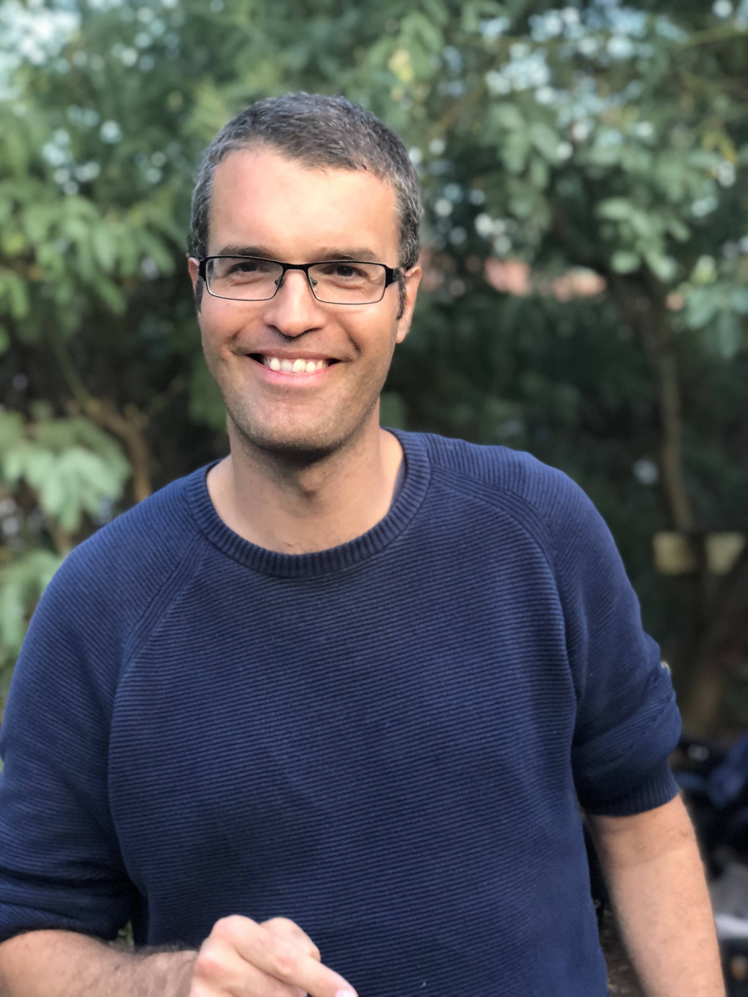 Portrait